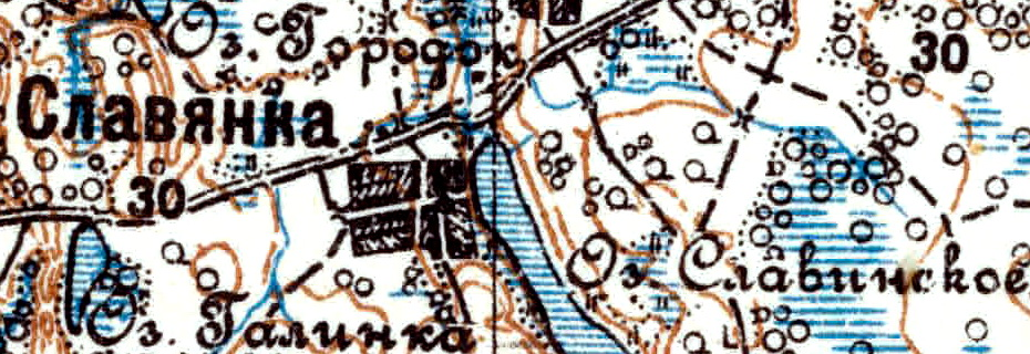 Топографическая карта Ленинградской области, квадрат VIc-26 (Ставотино), деревня Славянка